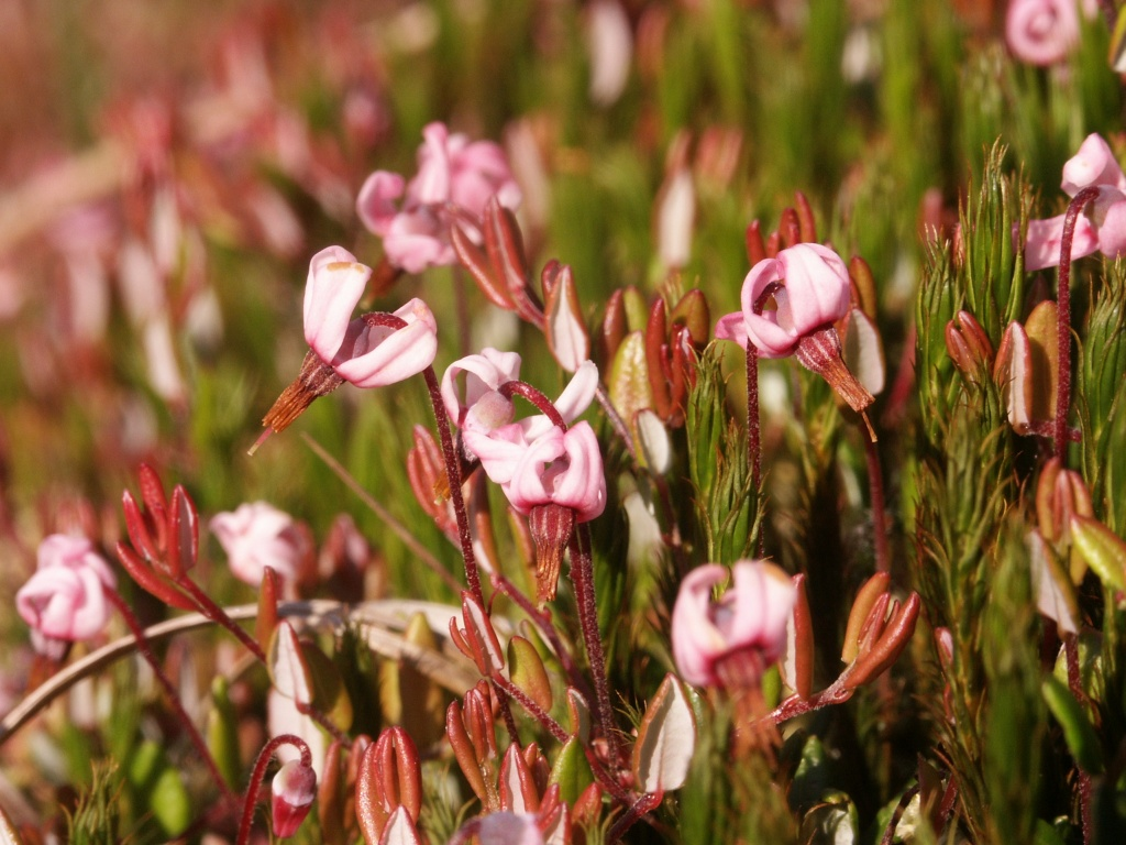 Vaccinium oxycoccos, Schwäbische Alb, Germany